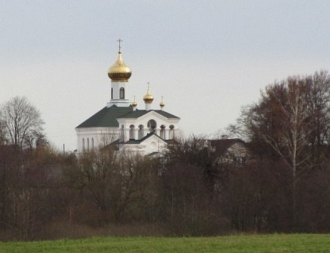 Дарава. Сучасная Свята-Троіцкая царква